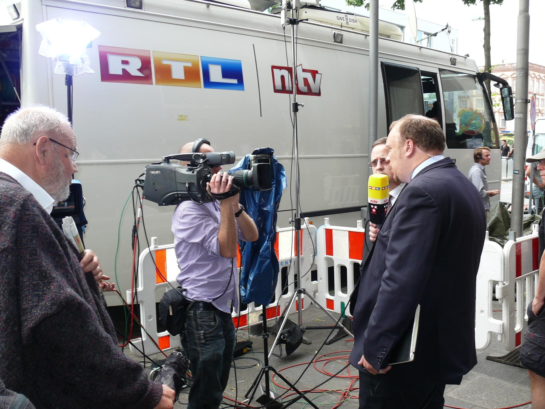 Urteil im Kachelmannprozess am Landgericht Mannheim